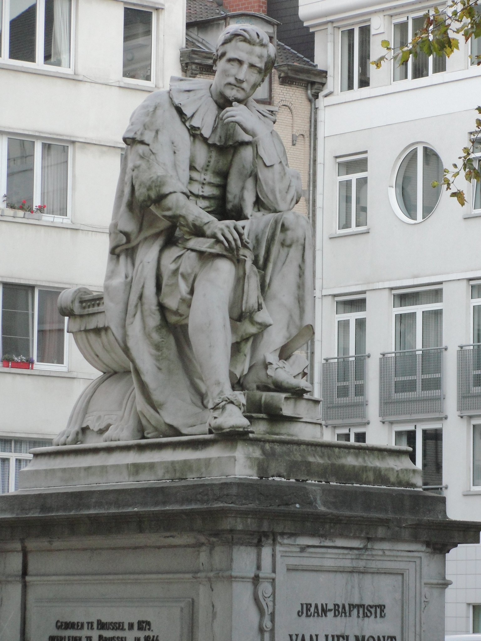 Standbeeld van Johannes Baptista van Helmont; beeldhouwwerk van Gerard Vander Linden; sokkel ontworpen door architect Louis Delacenserie, onthuld in 1889. Nieuwe Graanmarkt, Brussel